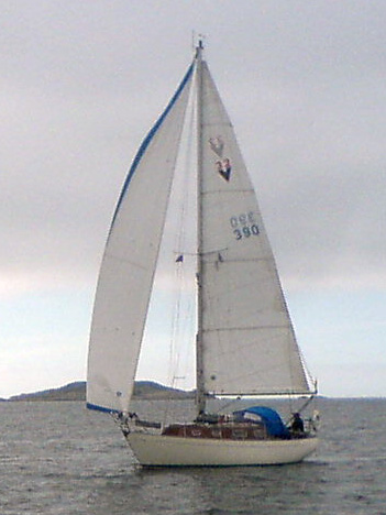 Vindø 32